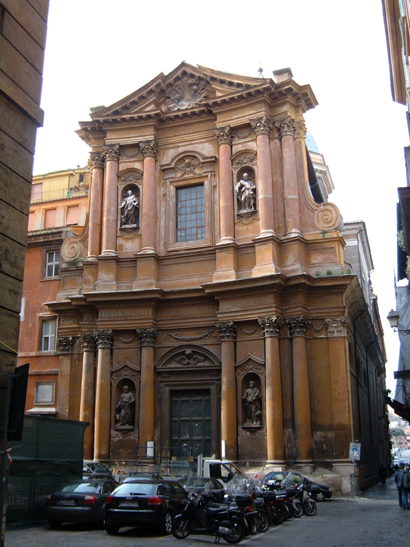 Chiesa della SS. Trinità dei Pellegrini a Roma, nel rione Regola.